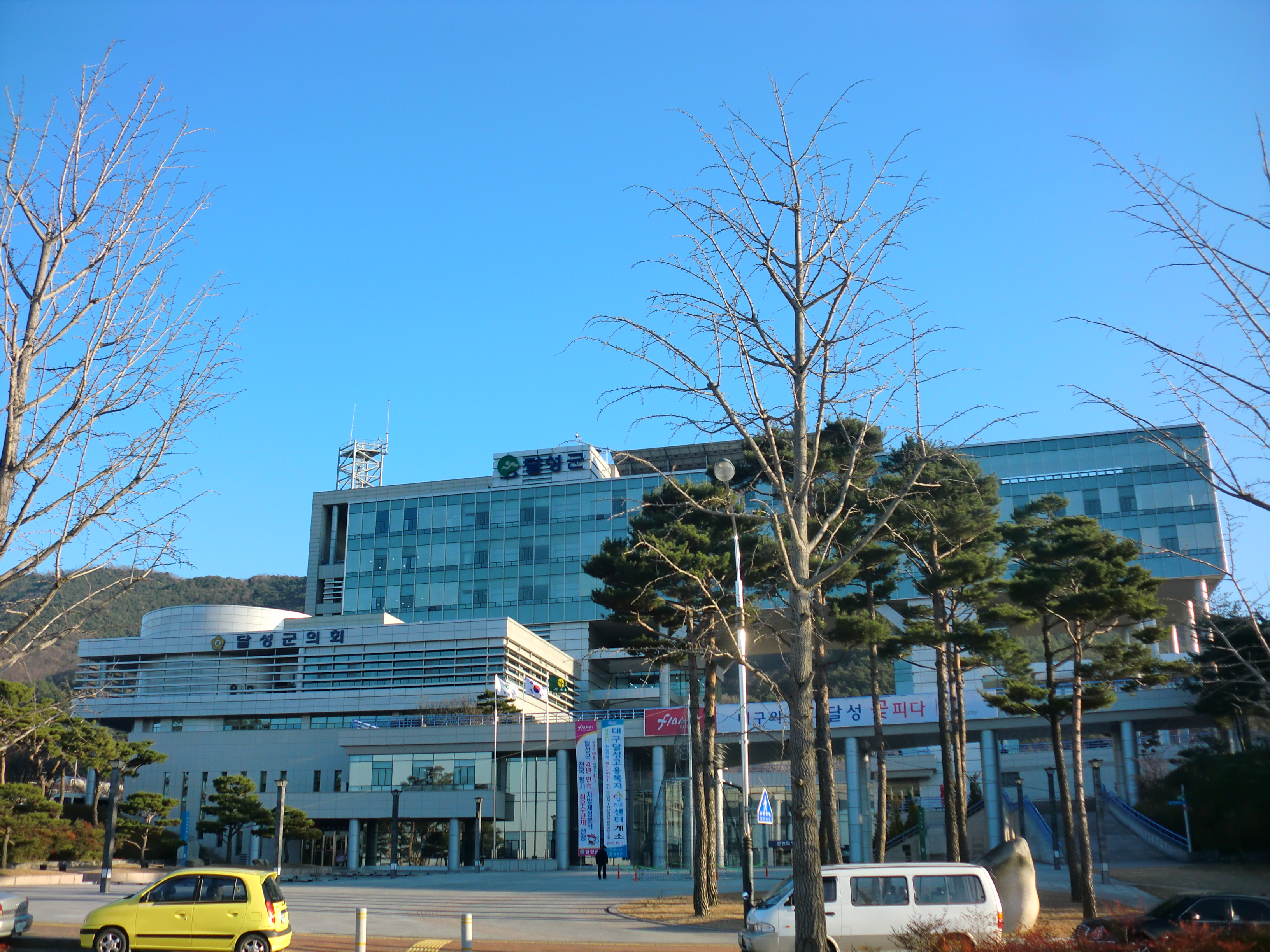 대구광역시 달성군에 있는 달성군청